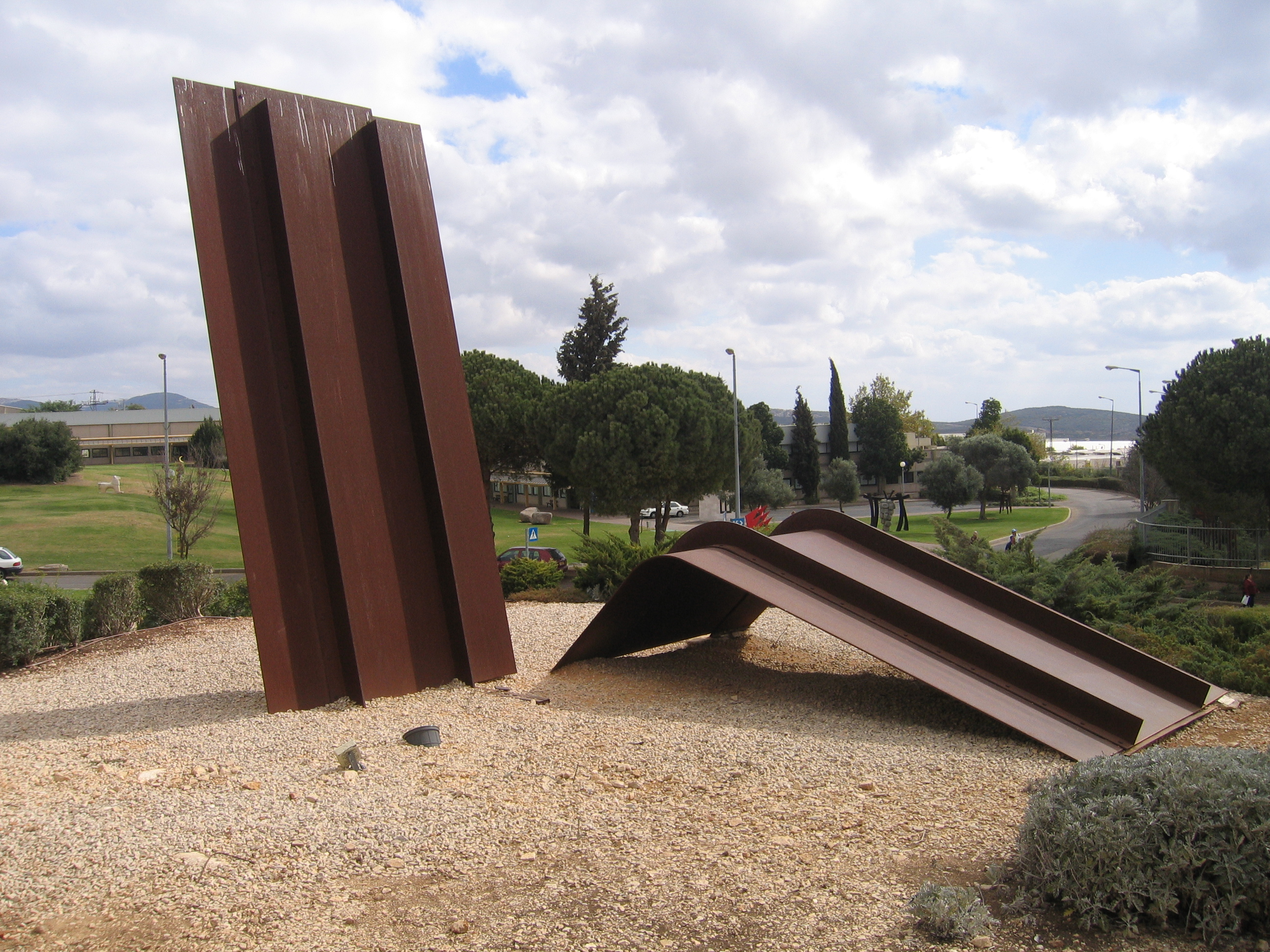 Sculpture